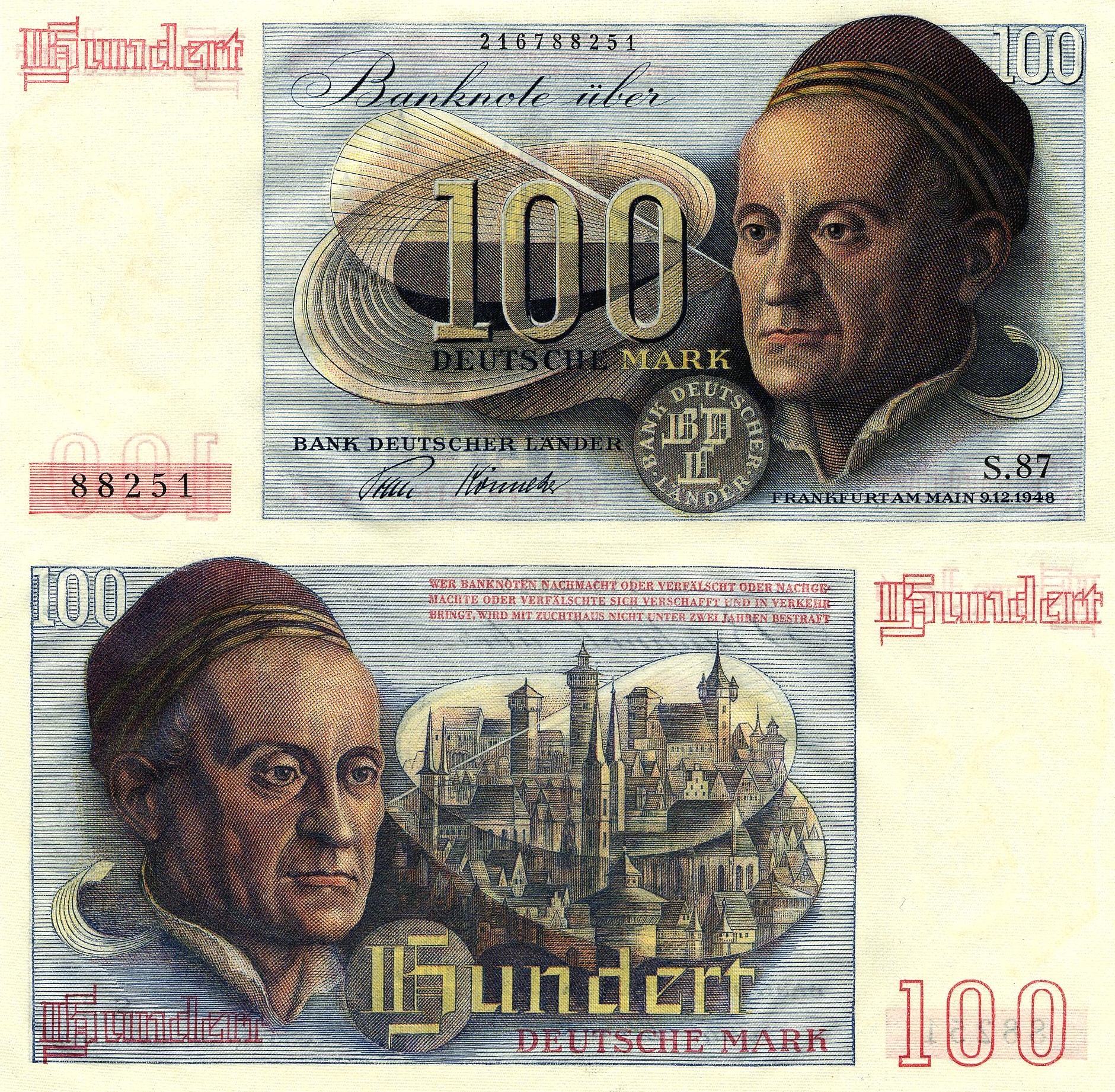 100 DM Banknote (Serie 2) - Serie II BdL )